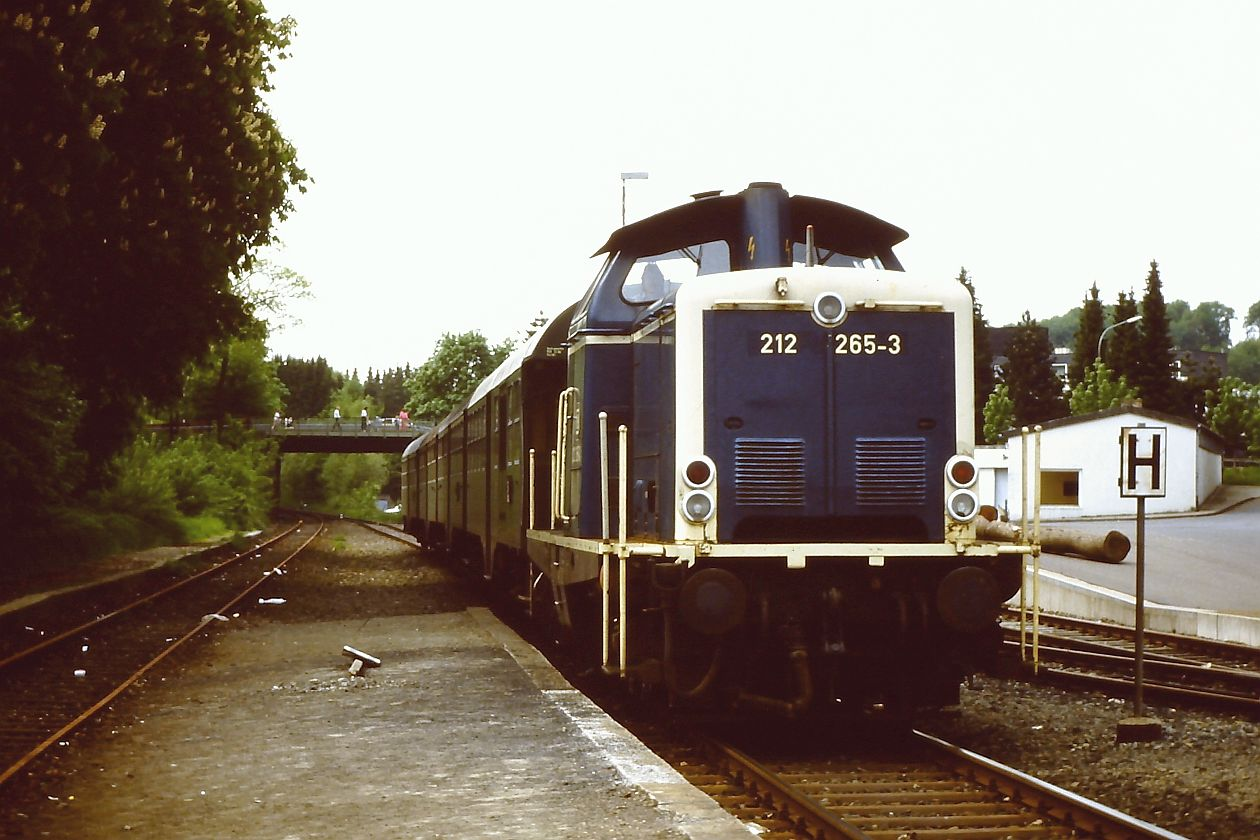 DB 212 265-3 am 22.5.1986 in Hückeswagen mit N 6073